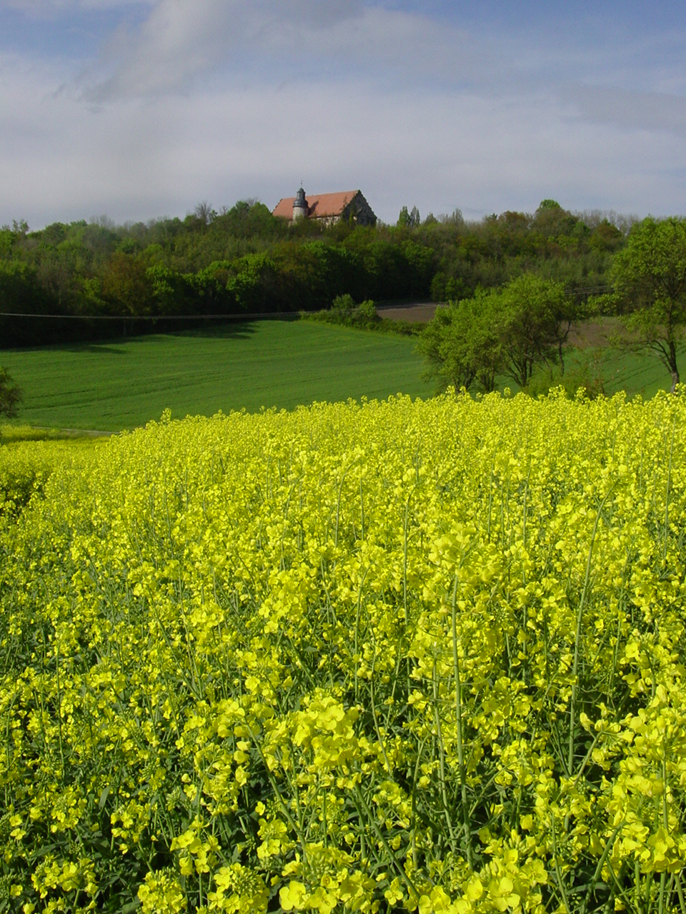 Schloß Bettenburg, Hofheim i. UFr., Landkreis Haßberge; selbst aufgenommen; Mai 2005